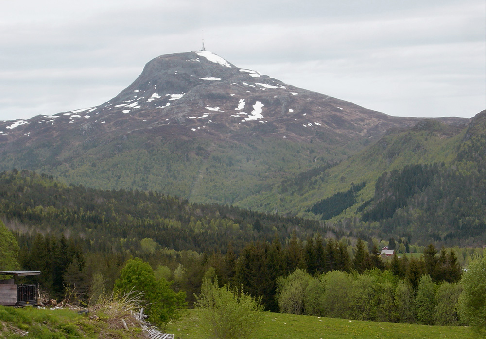 Gjemnes and the Reinsfjellet